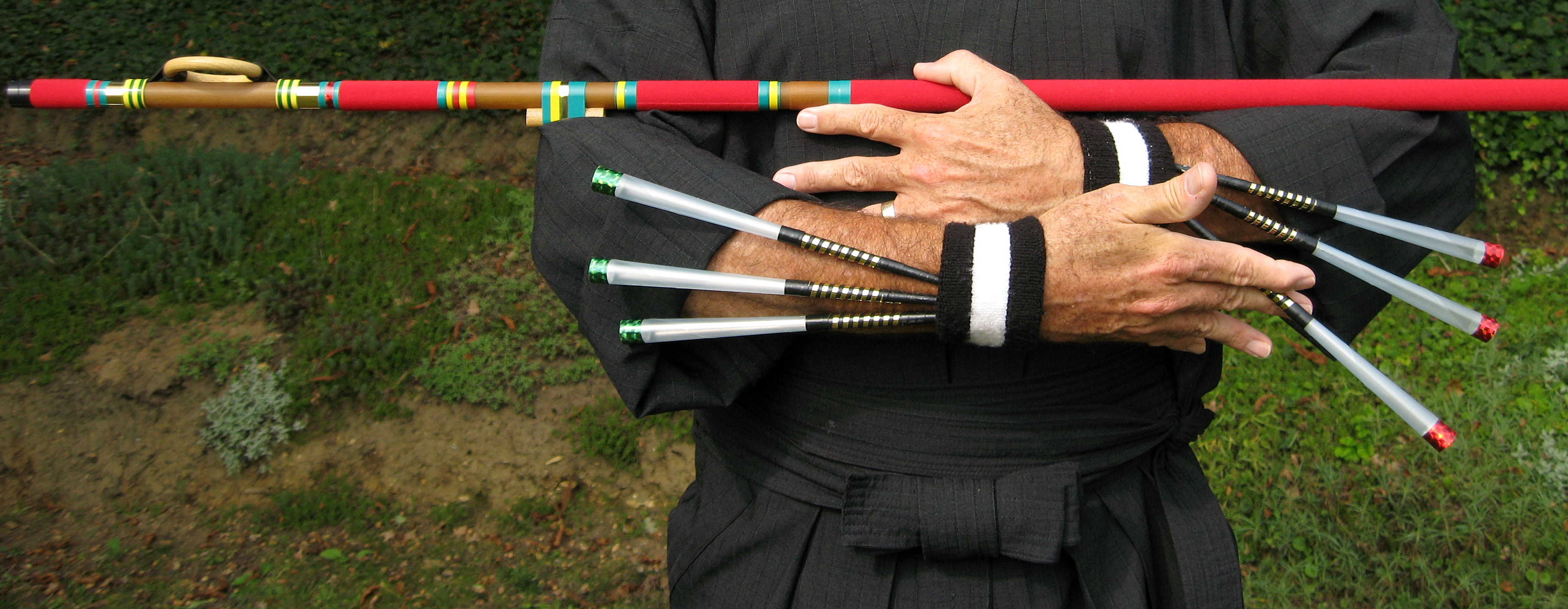 La Voie du Sarbacana: Les flèches (voiles)sont placées aux deux poignets, glissées sous des "serre-poignets" en tissu élastique du type de ceux utilisés pour le tennis. Il s'avère que ce positionnement des flèches est parfaitement ergonomique pour faciliter les manipulations de saisies de flèches et d'insertions dans la sarbacane durant le kata.